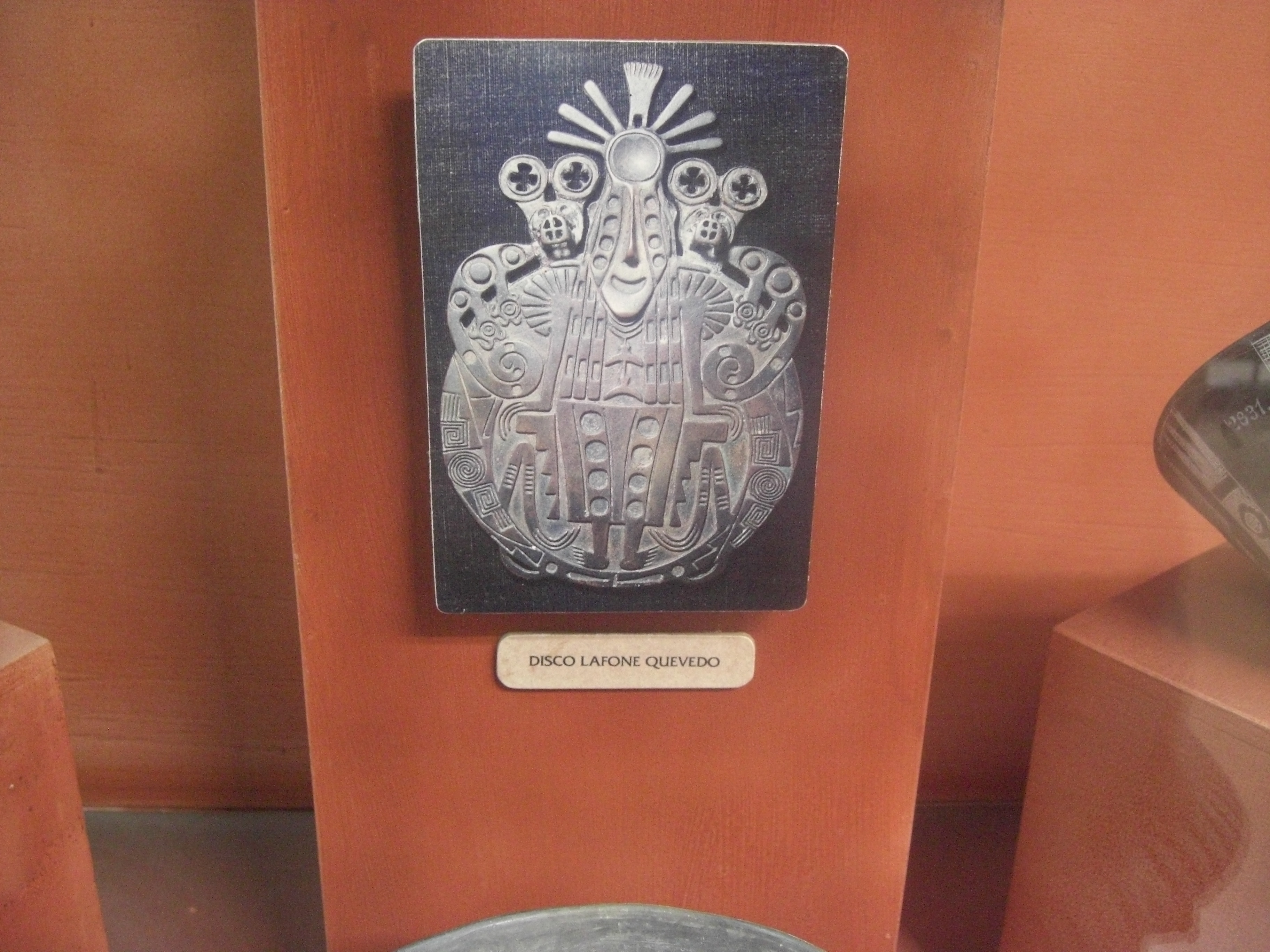 Detalle de la vitrina dedicada a la cultura La Aguada (Disco Lafone Quevedo) .Museo de la Plata. Argentina